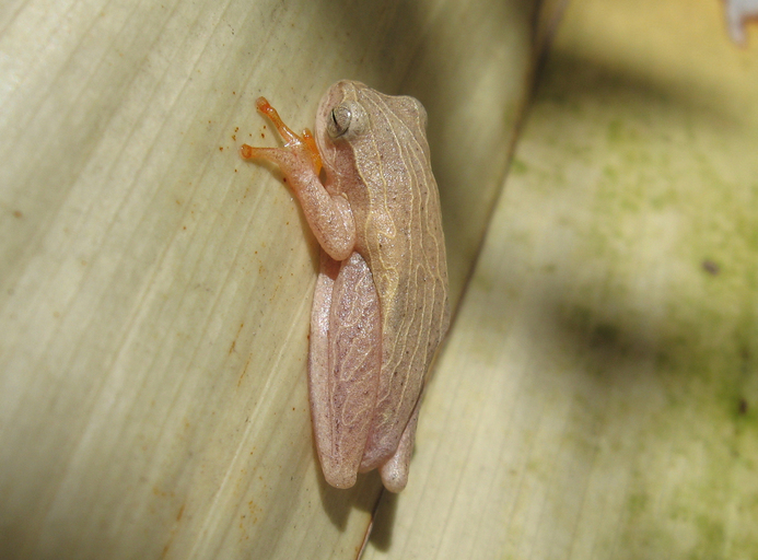 Dendropsophus minutus